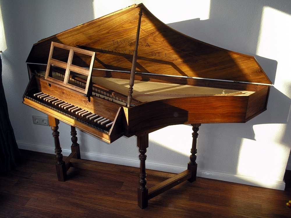 اسپینت